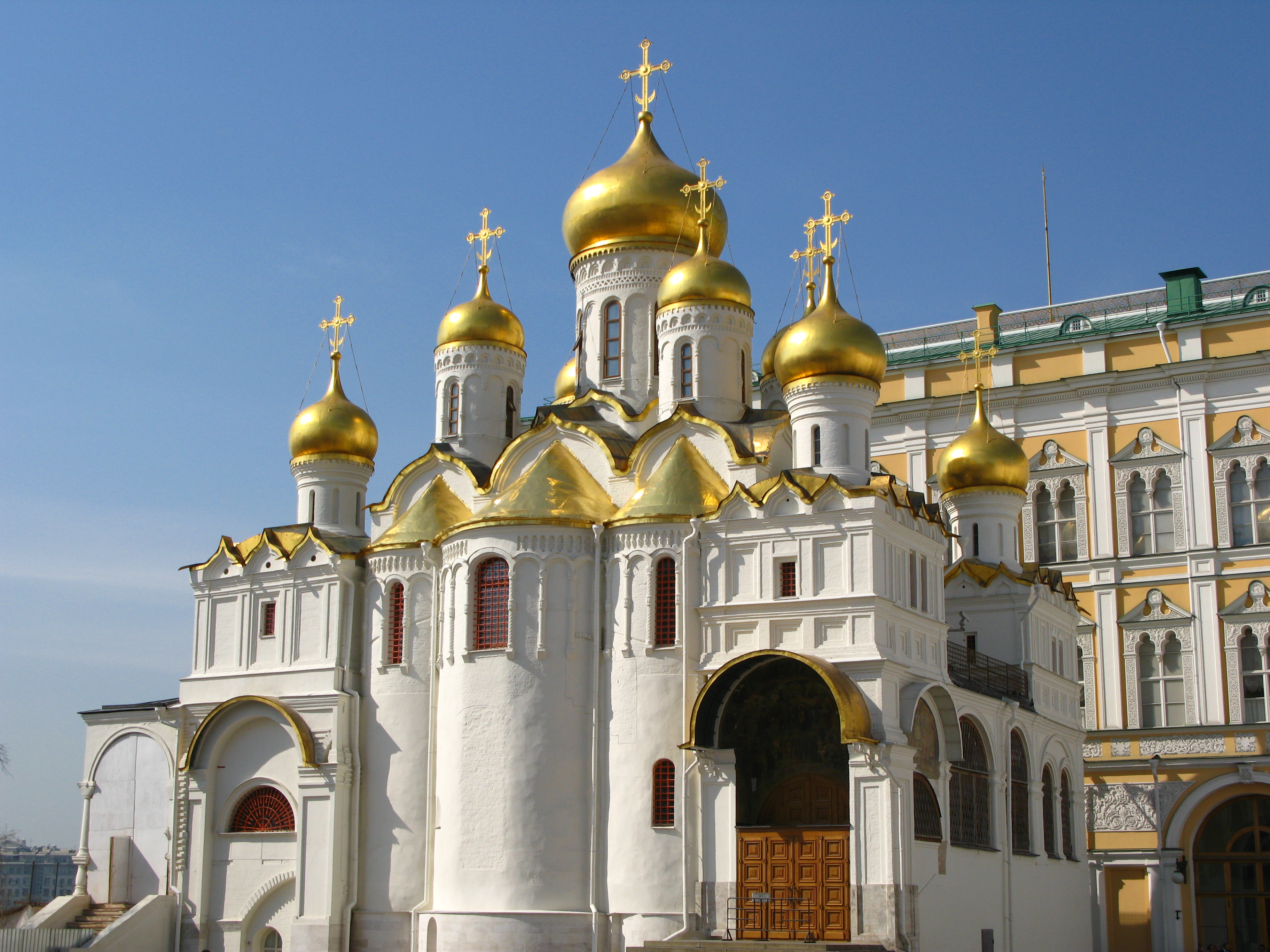 Благовјештански сабор. Кремељ, Москва.